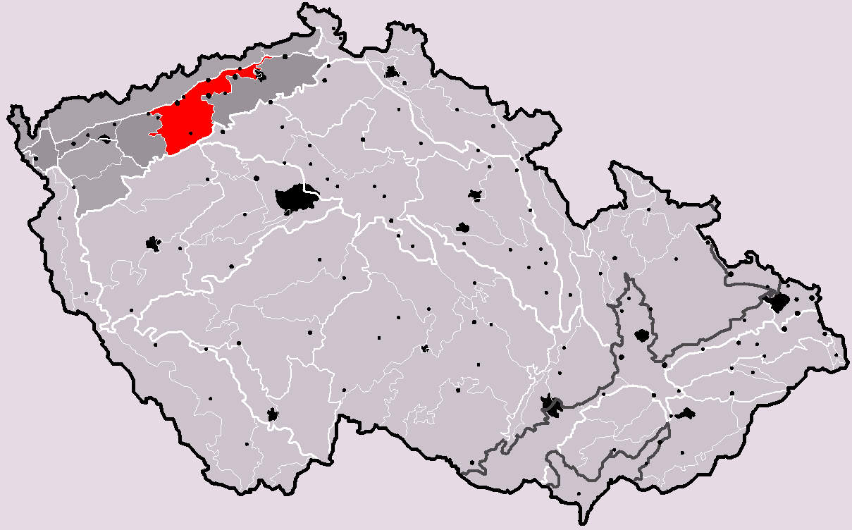 Poloha geomorfologického celku Mostecká pánev v rámci České republiky. Hercynský systém Hercynská pohoří I Česká vysočina I3 (III) Krušnohorská subprovincie I3B (IIIB) Podkrušnohorská oblast I3B-3 (IIIB-3) Mostecká pánev